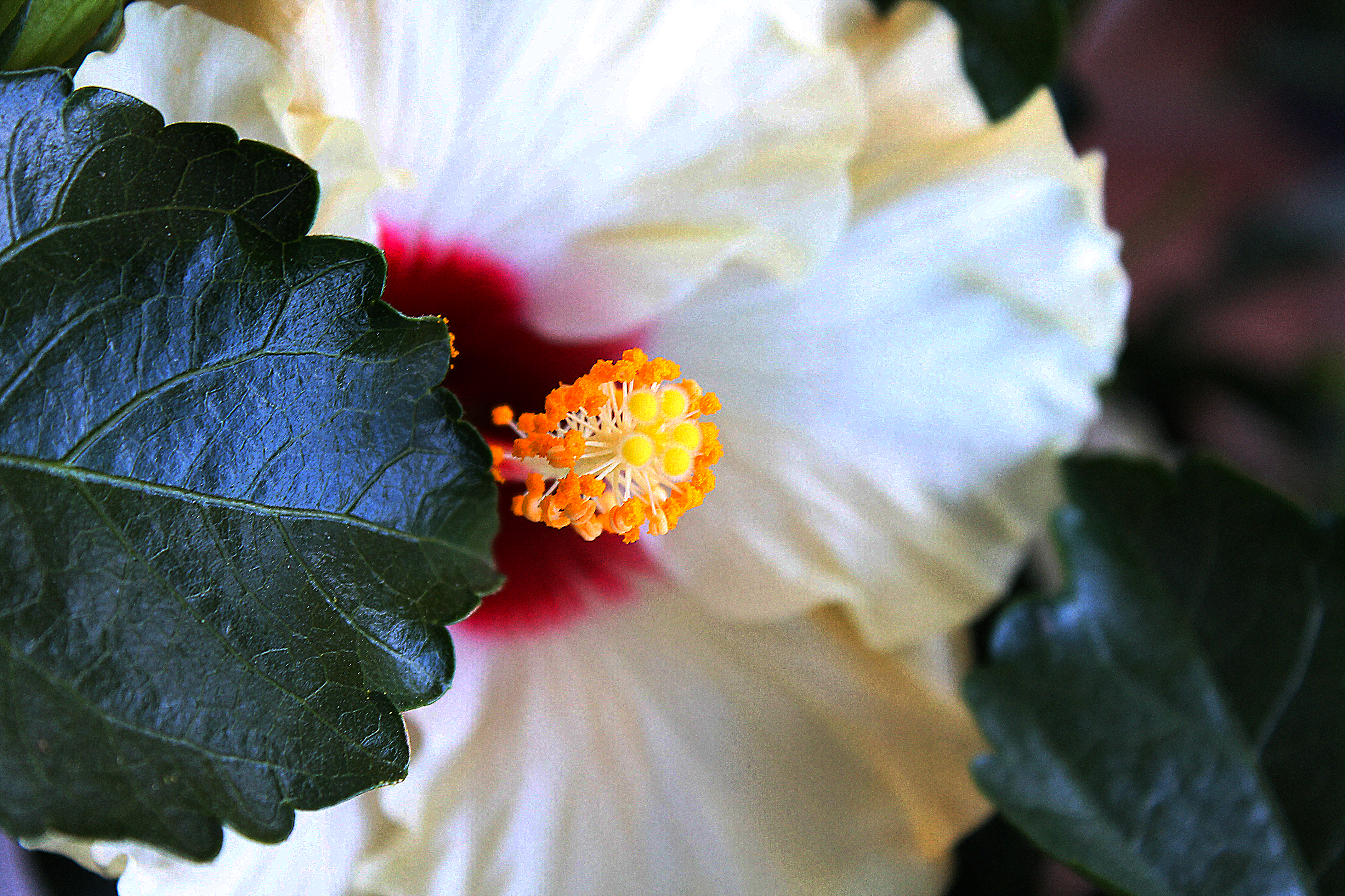 This photo was taken by Claudio Cuomo.